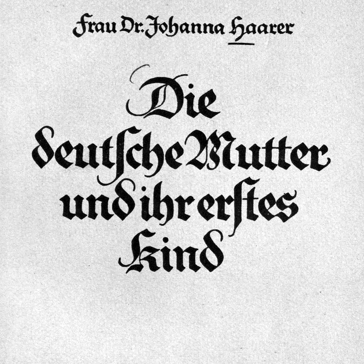 Ausschnitt des Covers